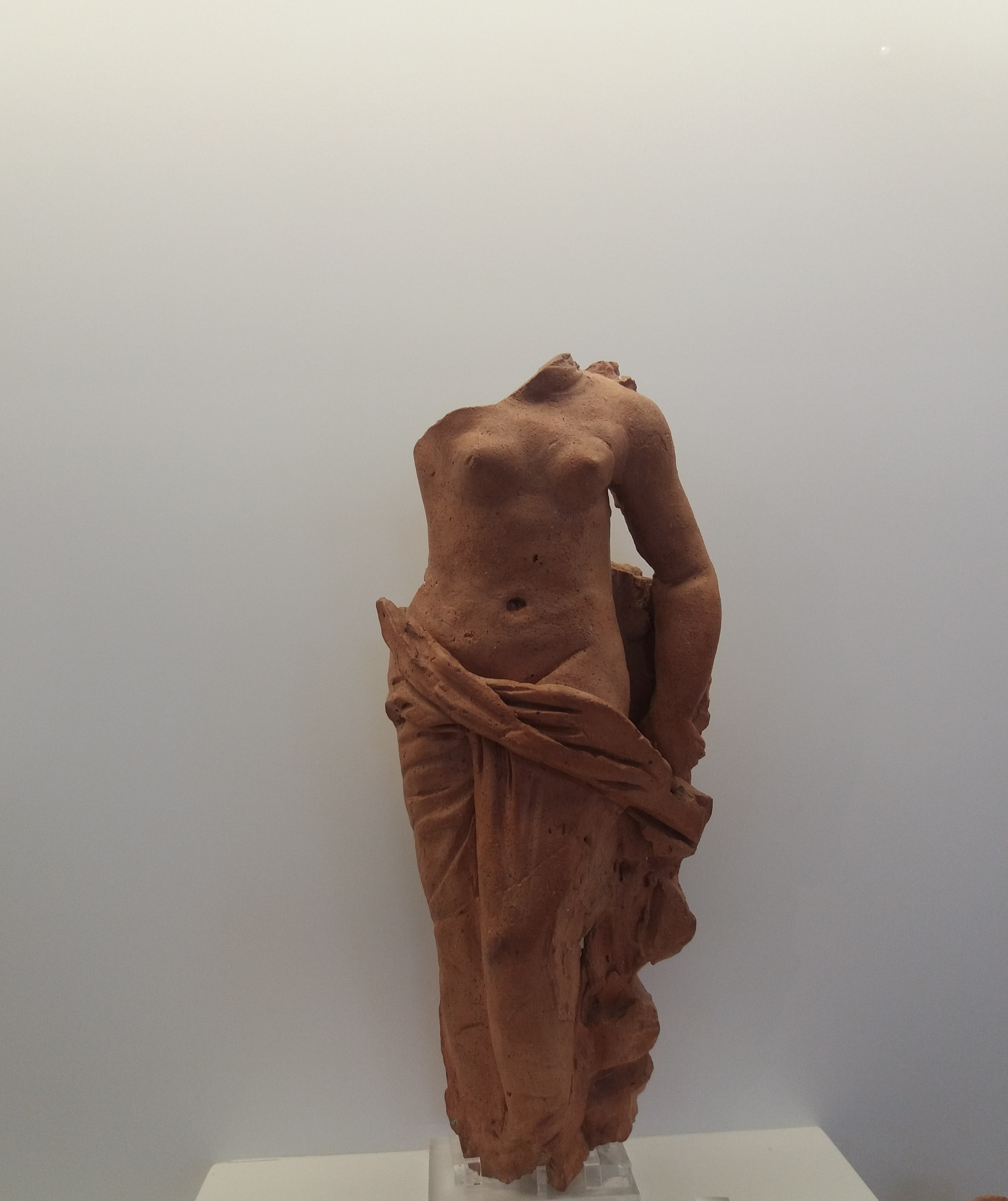 Афродита, Херсонес